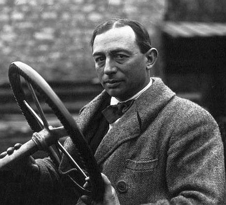 André Lagache le 21 avril 1921, sur Chenard et Walcker au Grand Prix Sport de la Corse (cropped)